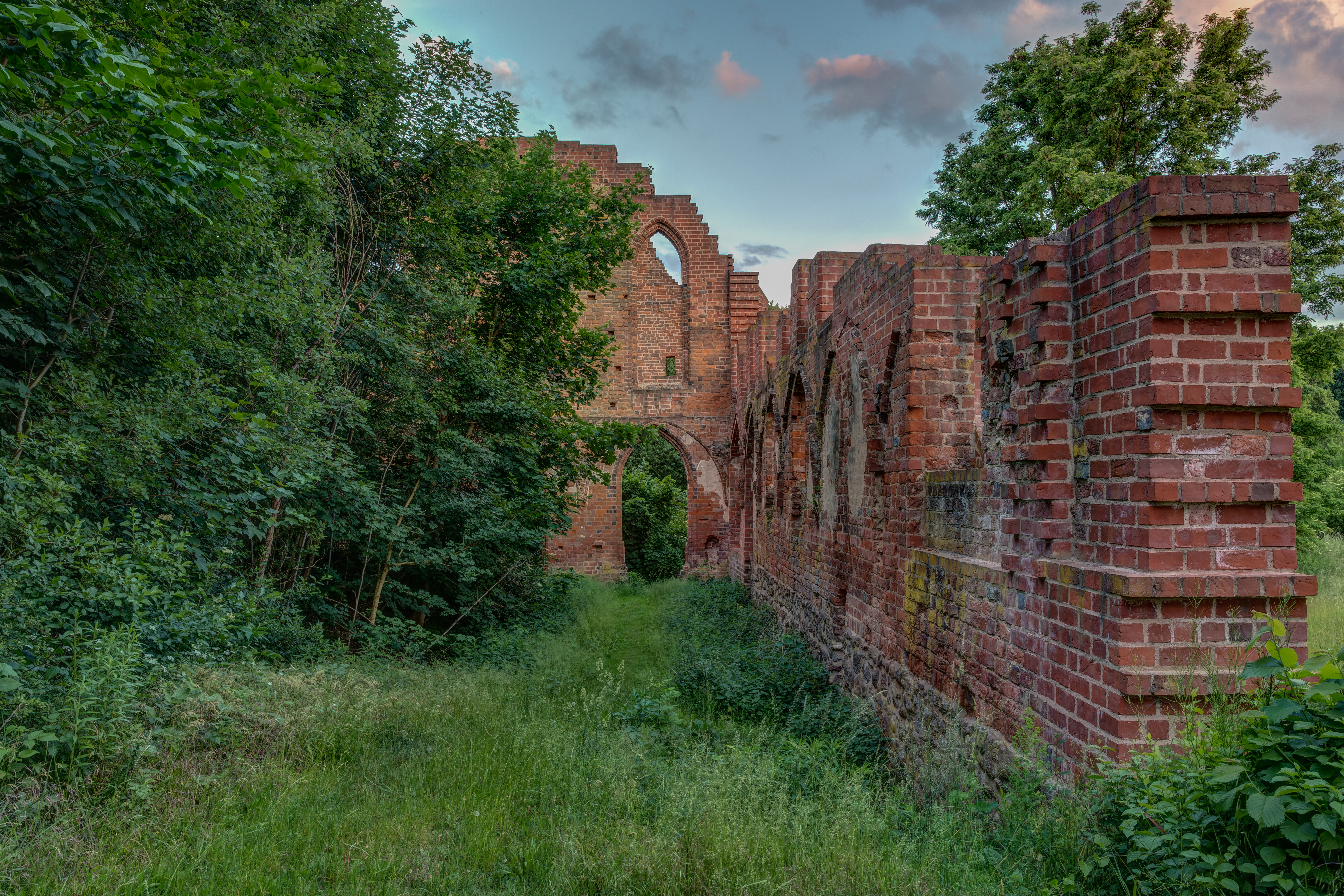 Zisterzienser Nonnenkloster in Boitzenburg